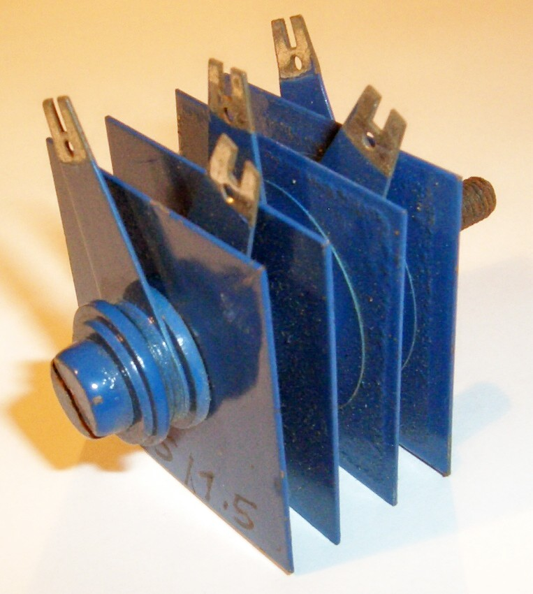 Abbildung eines Selengleichrichters, Baujahr ca. 1955